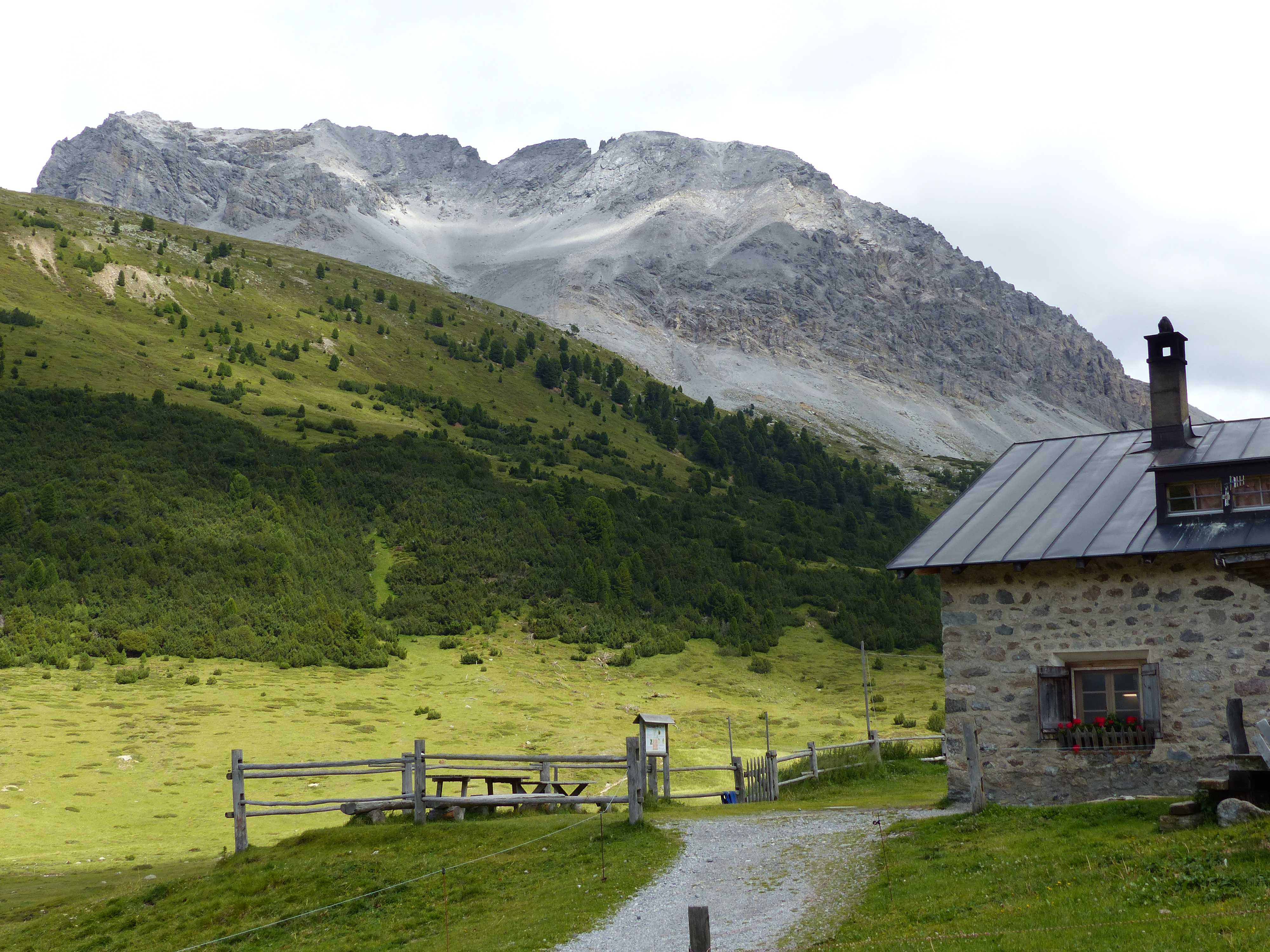 Alp Astras mit Piz Murtera